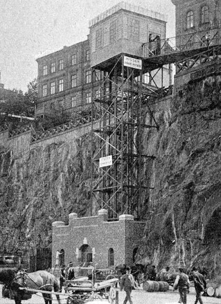 Stadshårdshissen på Södermalm i Stockholm